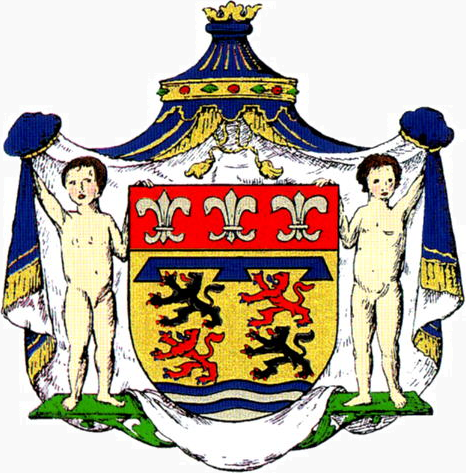 Wapen gemeente Beverwijk